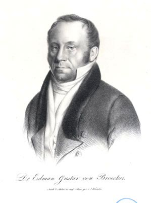 Erdman Gustav von Broecker